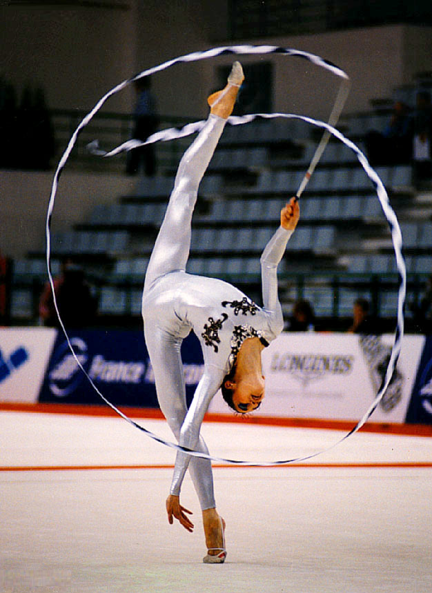 La gimnasta española Alba Caride en el Europeo de Oporto en 1998.